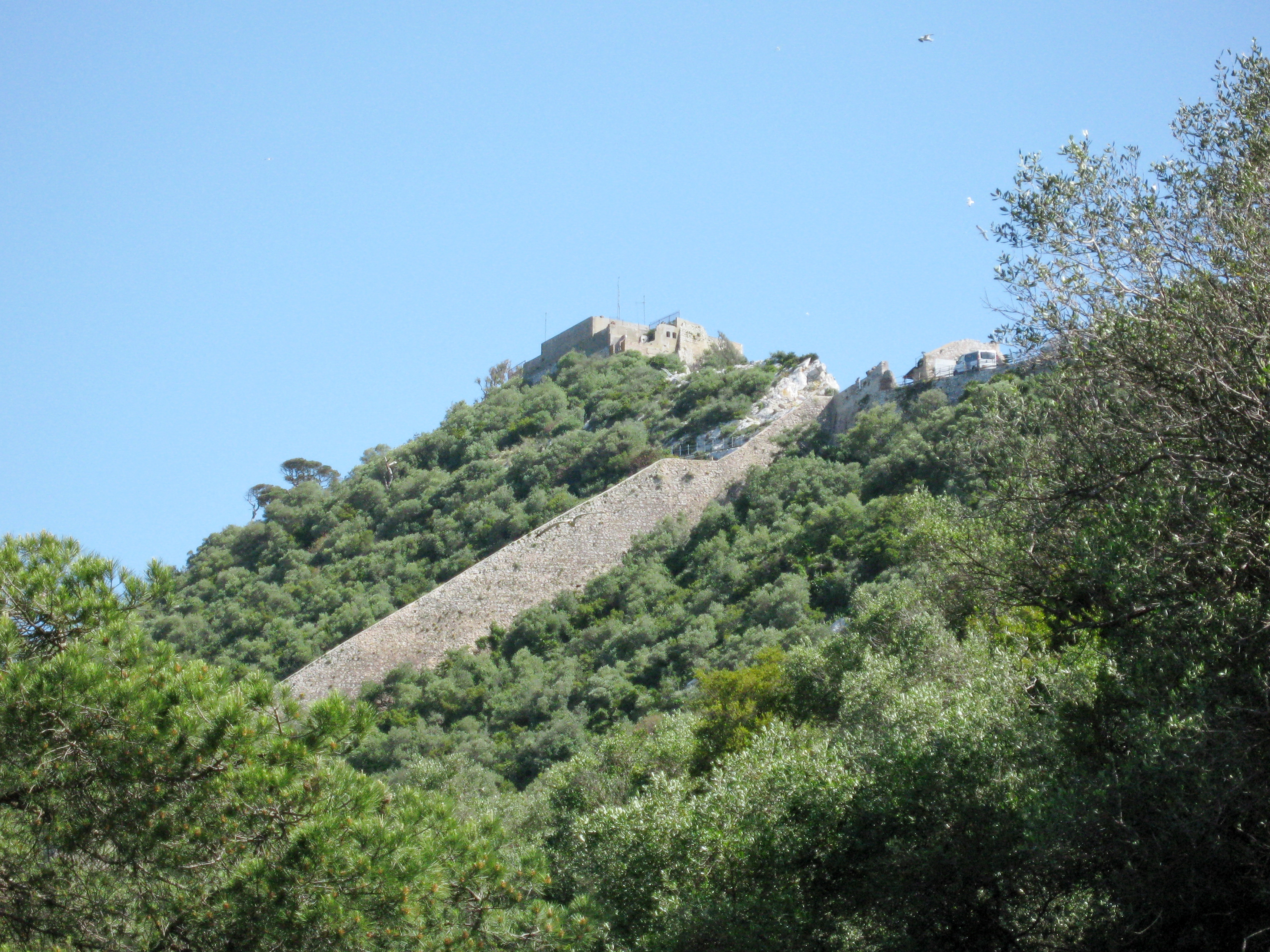 Felsen von Gibraltar (Upper Rock)